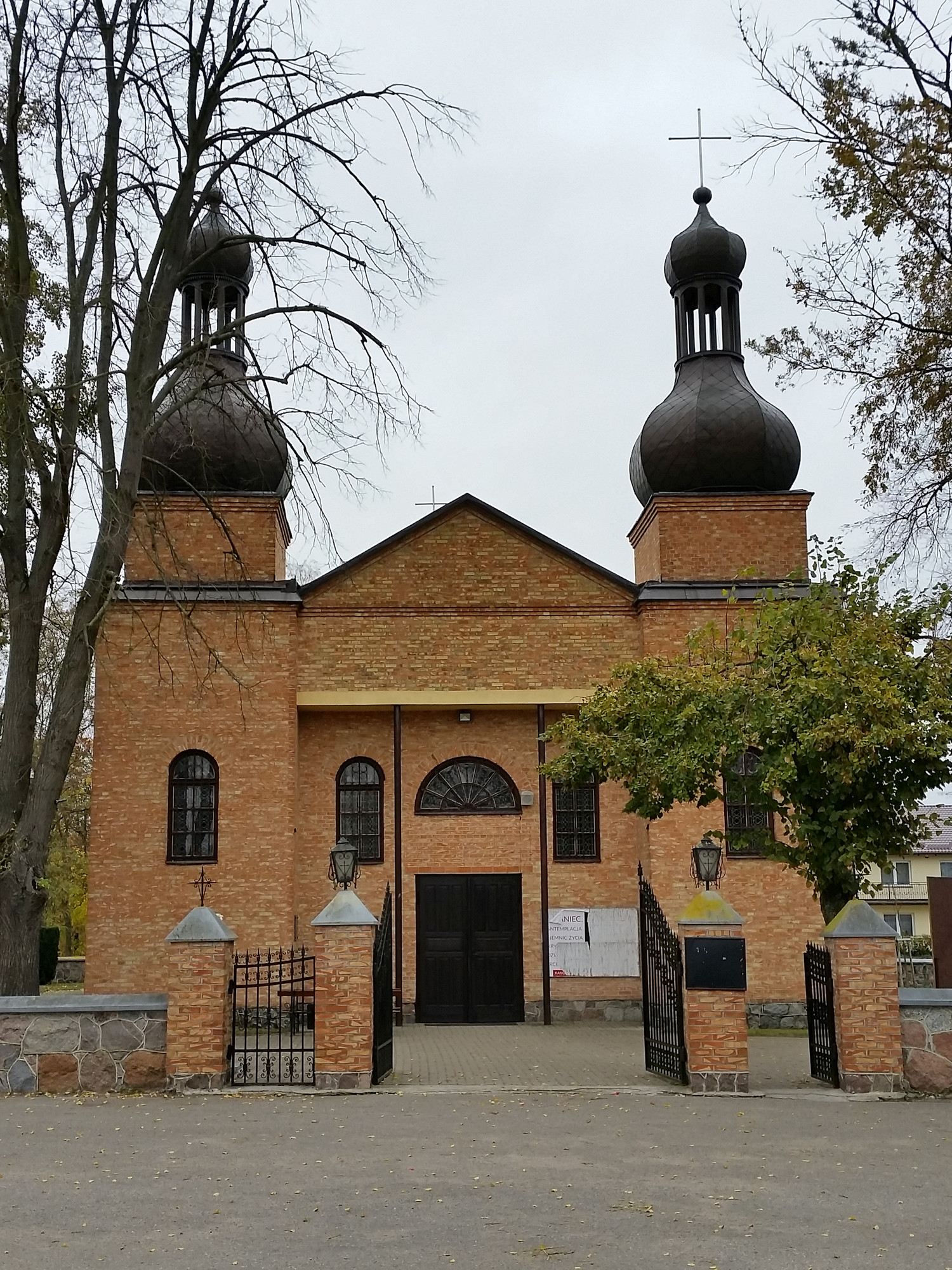 Kościół pw. Przemienienia Pańskiego w Daniszewie (powiat płocki).